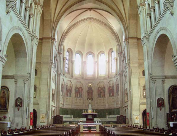 Blick vom Langhaus zum Presbyterium, Canisiuskirche, Wien